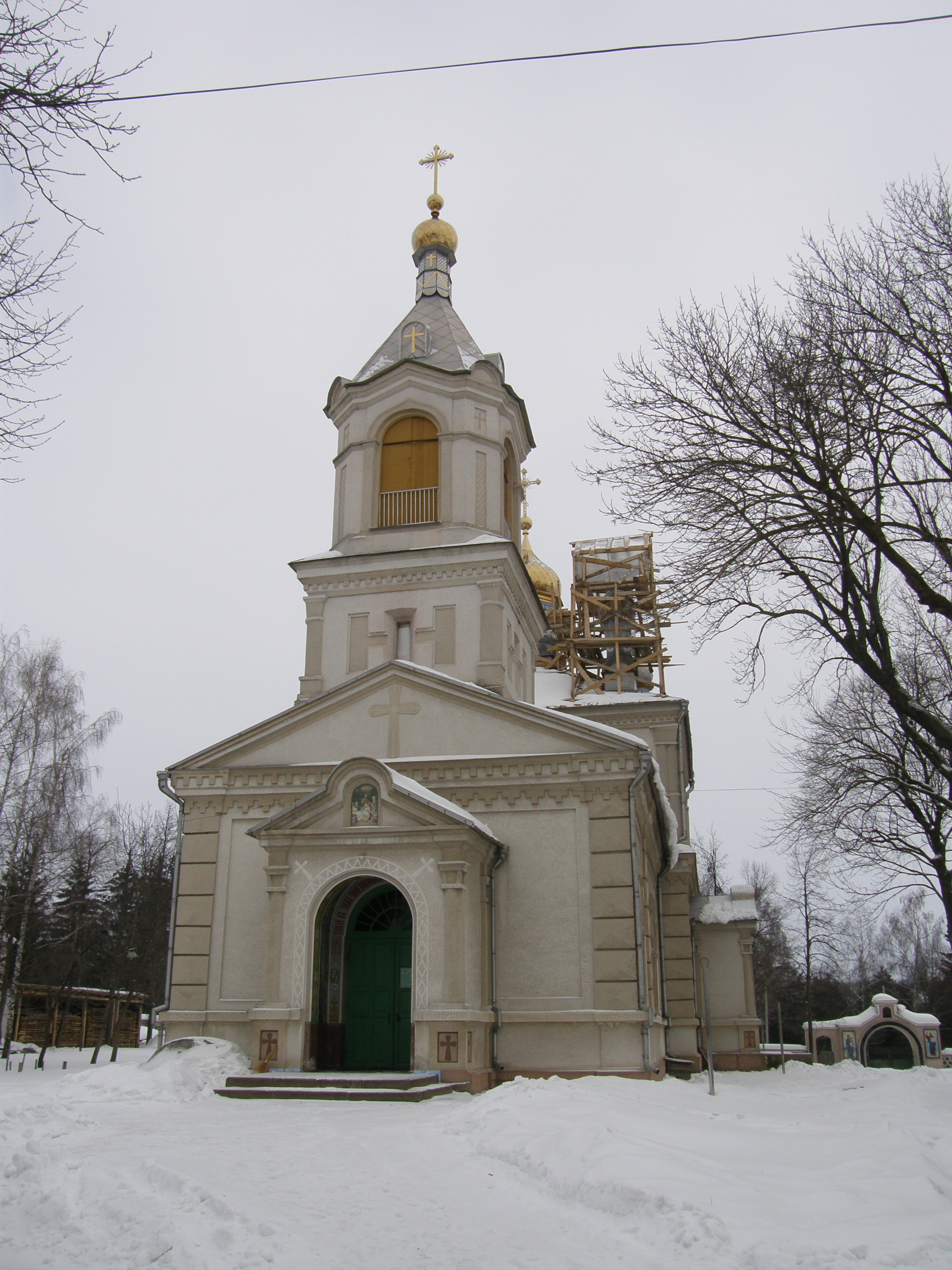 Церква Різдва Богородиці, Війтівка, вул. Леніна